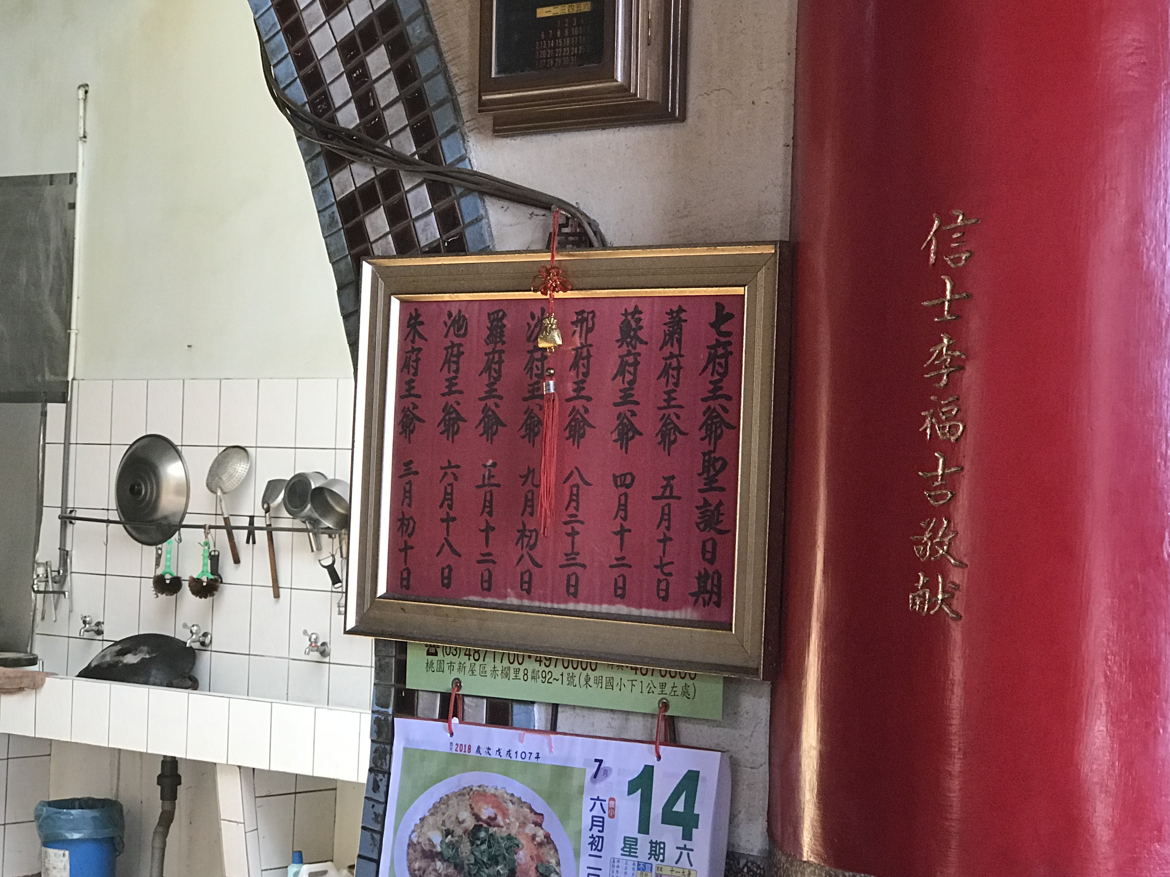 蚵殼港昭靈宮王爺聖誕表